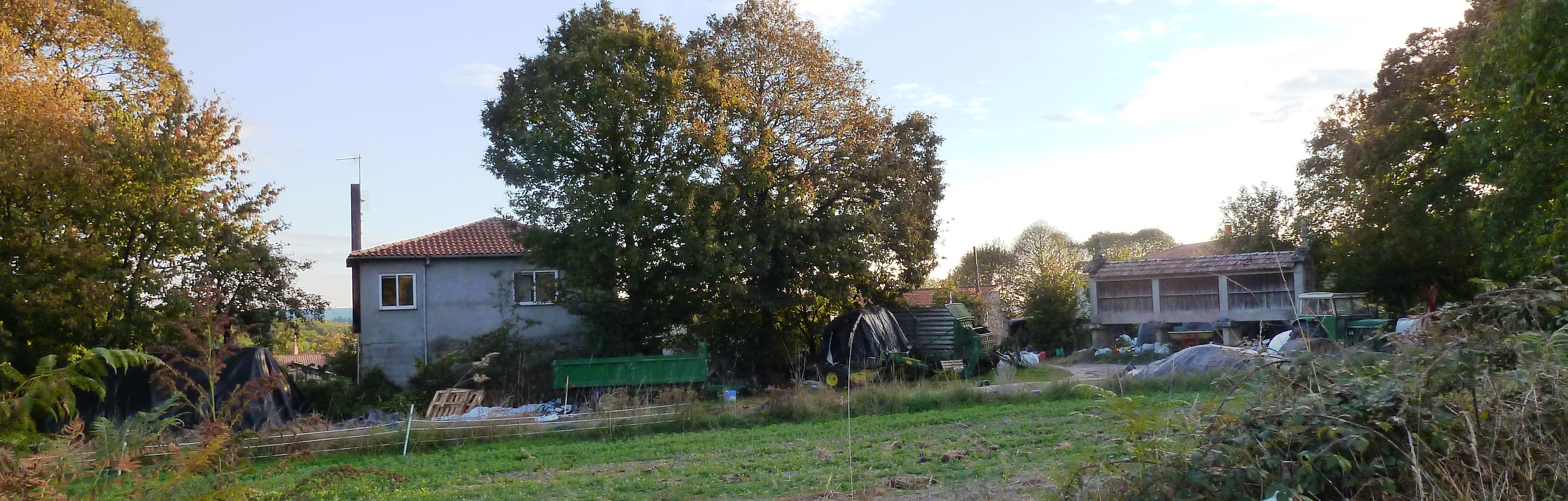 Casa do Outeiro de Buciños